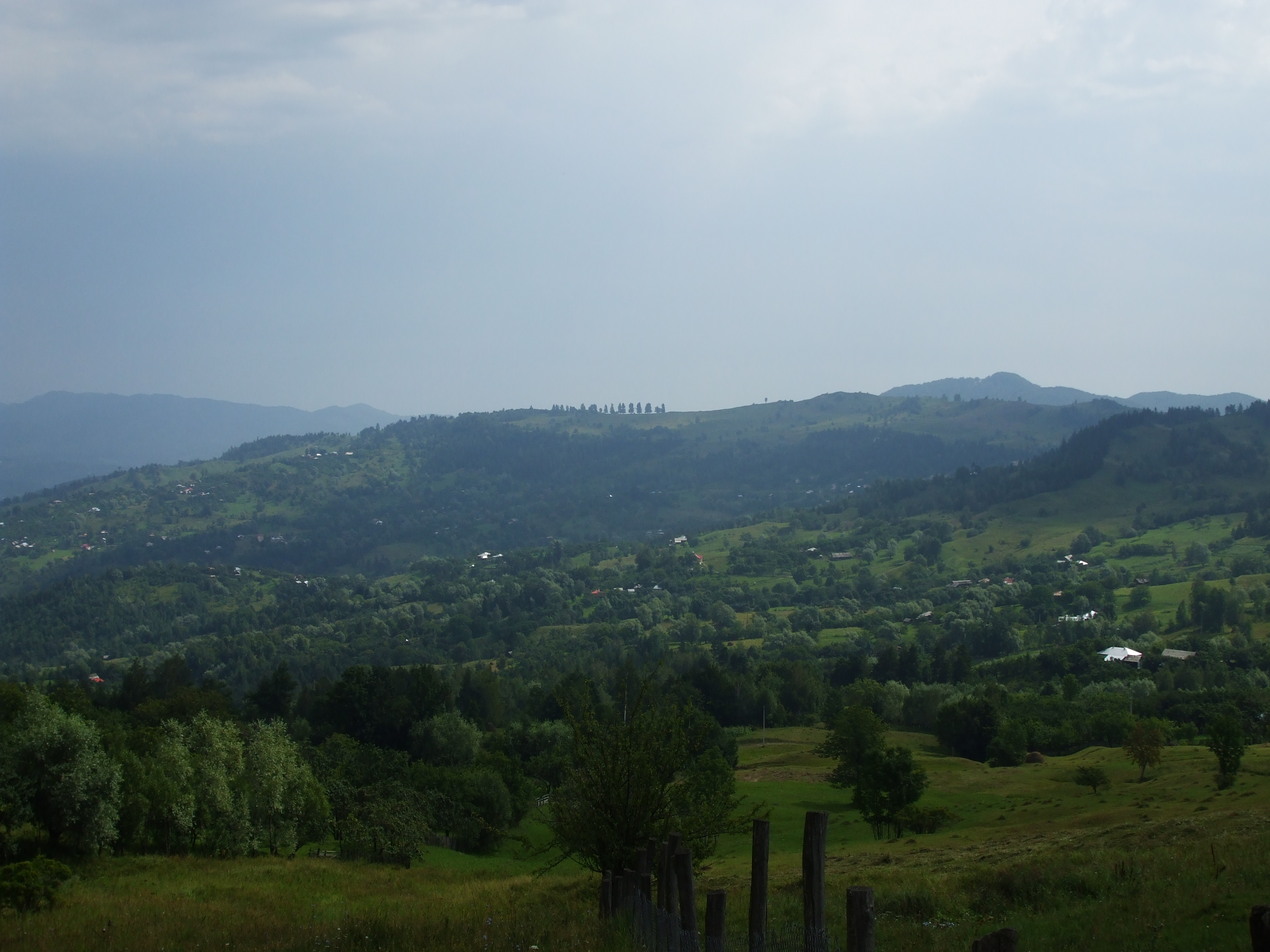 Bisoca, Buzau